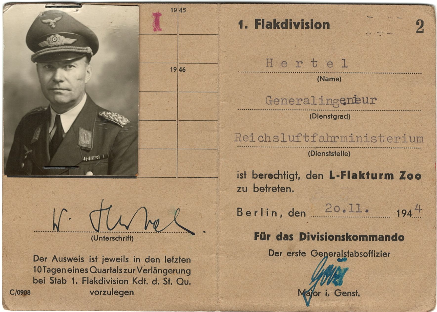 Zutrittsausweis von Walter Hertel als Generlingenieur in Berlin Ende 1944 für den L-Flakturm Zoo in Berlin